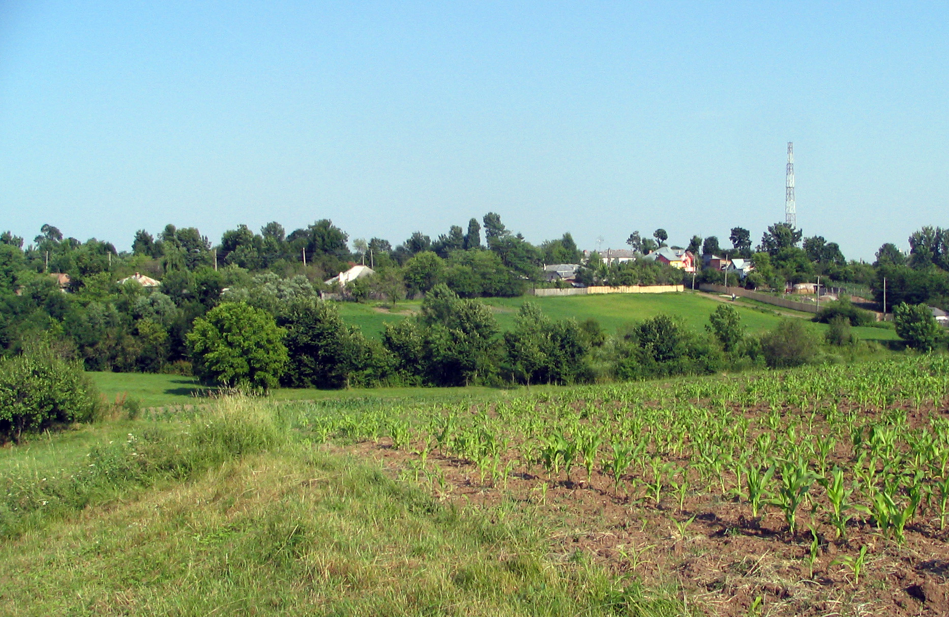 Ungheni, Argeş, România.